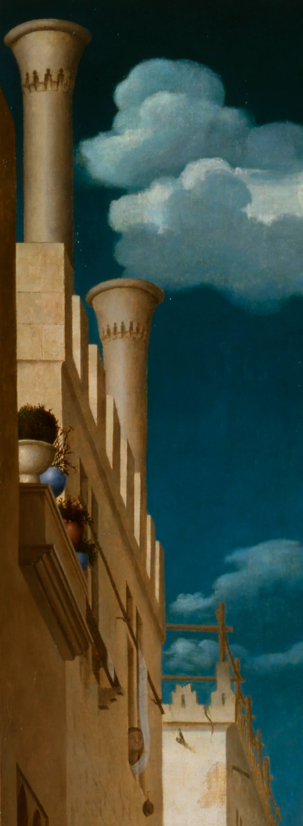 détail des bâtiments à gauche